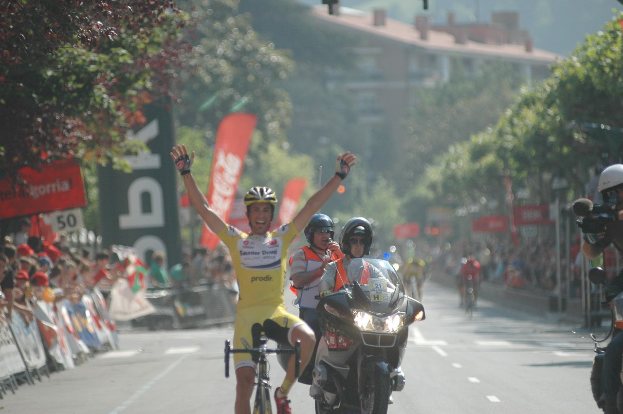 Alberto Fernandez de la Puebla Ramos, Euskal Bizikleta 2007, 1º etapa Eibar - Tolosa 172,2 km.